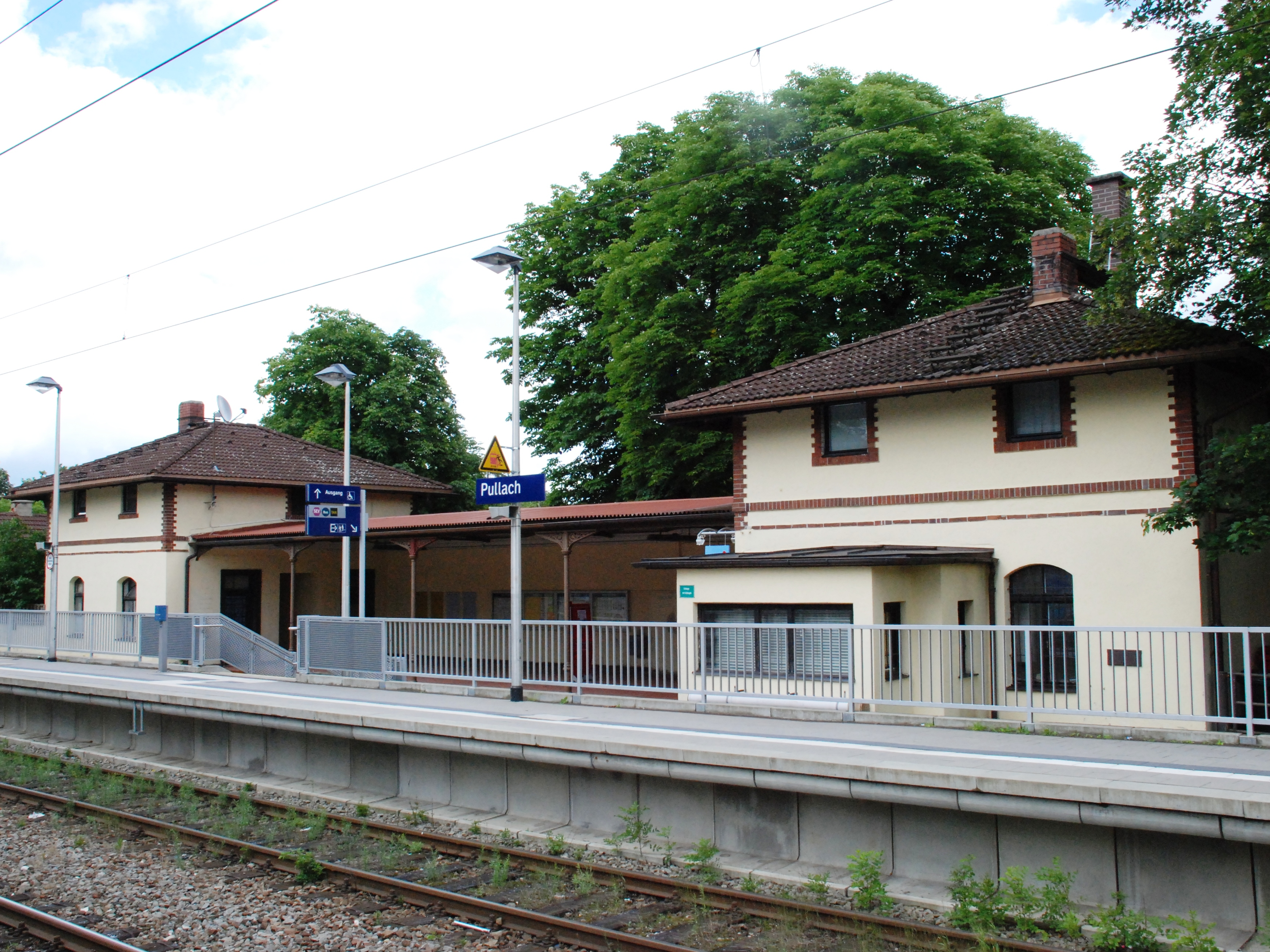 Bahnhof Pullach an der 1891 eröffneten Bahnstrecke München - Bichl in der Bahnhofstraße 10 in Pullach im Isartal, Landkreis München, Bezirk Oberbayern, Bayern. Als Baudenkmal in der Bayerischen Denkmalliste unter Aktennummer D-1-84-139-31 aufgeführt. Laut Denkmalliste erbaut um 1890. Foto gemäß den Voraussetzungen zur Panoramafreiheit von öffentlicher Verkehrsfläche aus aufgenommen.